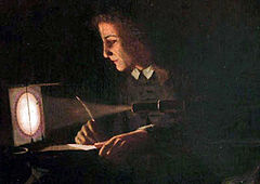 Jeremiah Horrocks